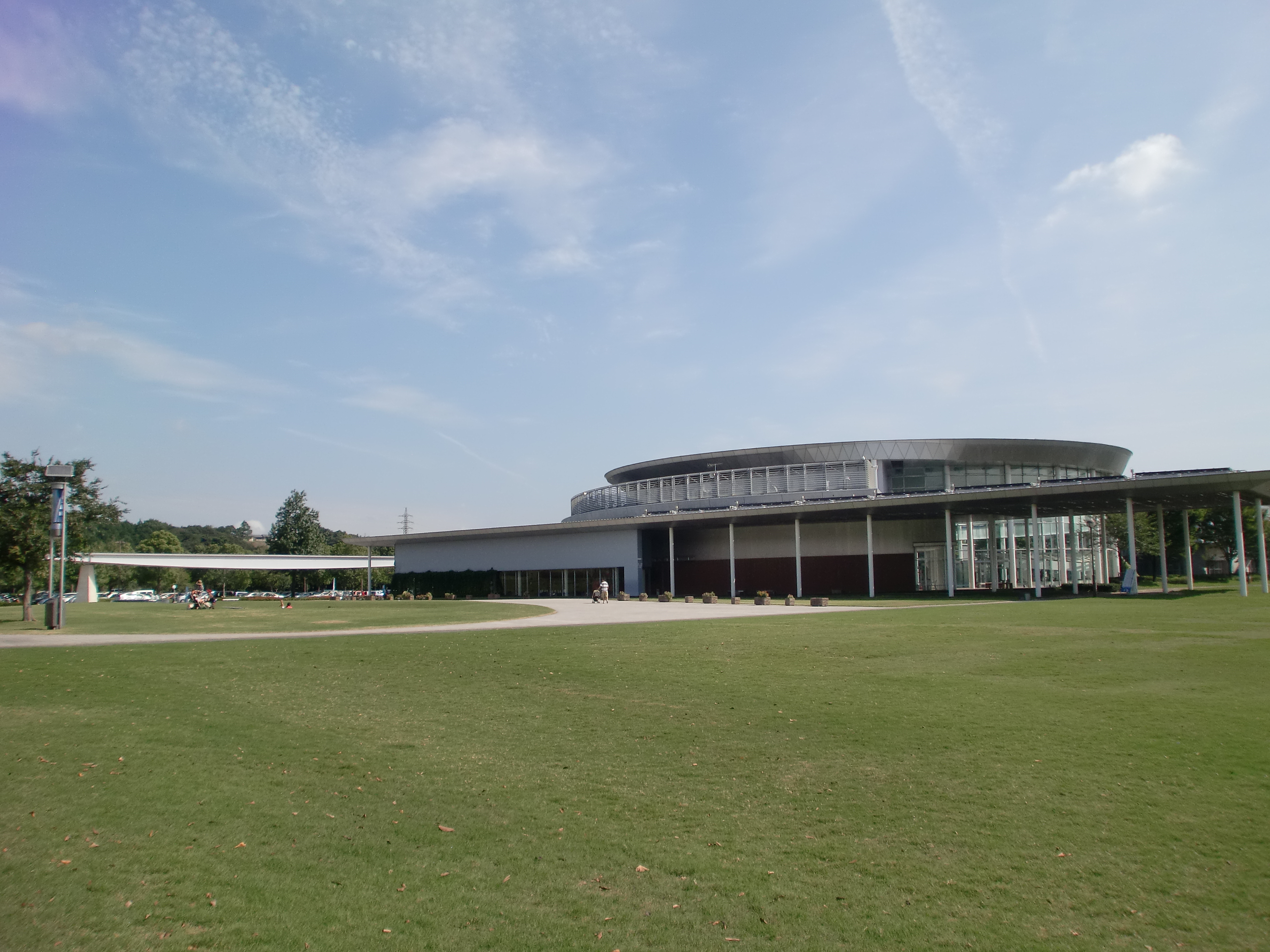 鹿児島ふれあいスポーツランドの建物とふれあい広場